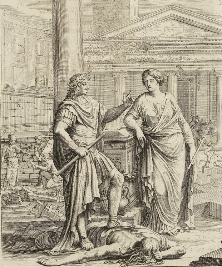 Le rétablissement des ecclésiastiques en Béarn.